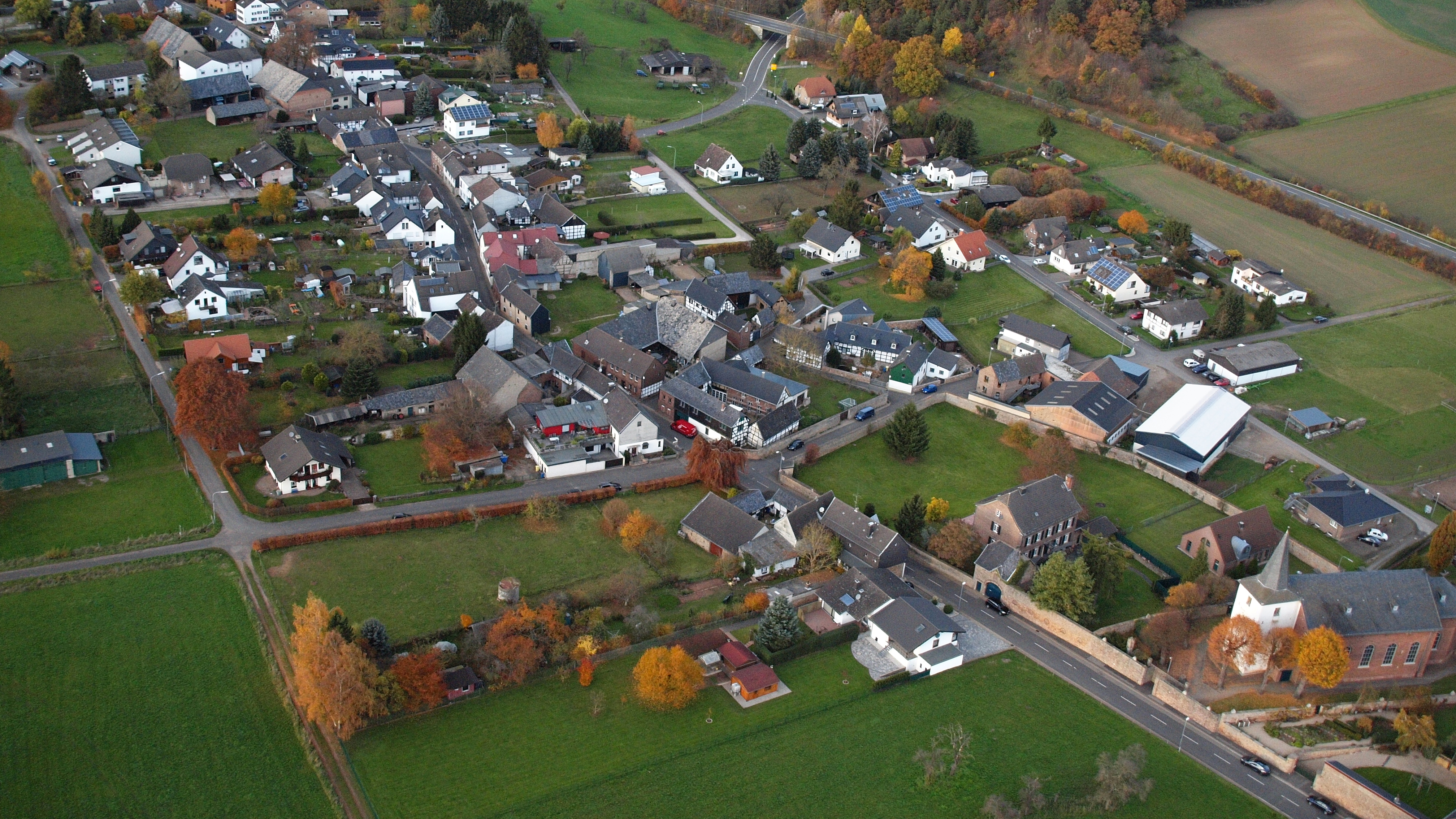 Holzheim (Mechernich), Luftaufnahme (2015)